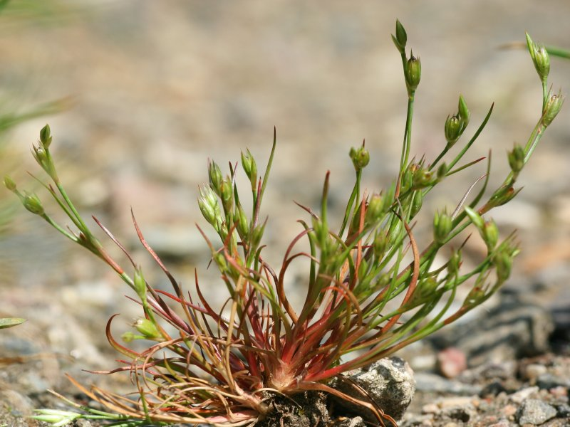 Kröten-Binse (Juncus bufonius)